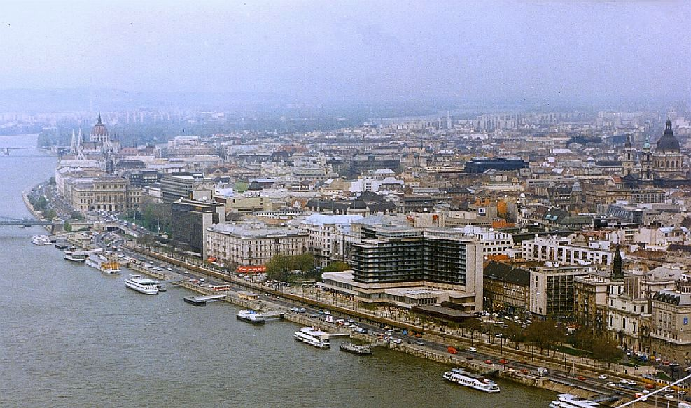 Budapeszt, fot. Chepry (Andrzej Barabasz)